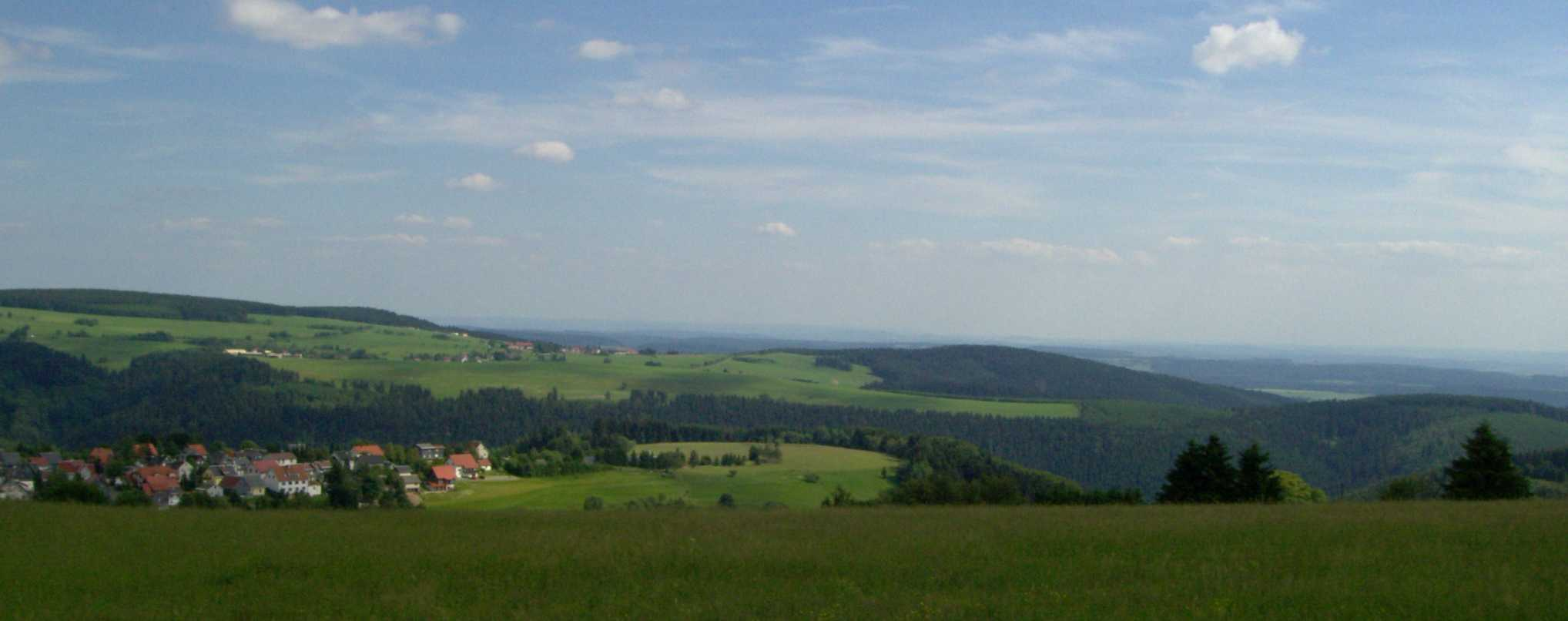 Blick vom Simmersberg (781m) auf Schnett (im Vordergrund) und Waffenrod-Hinterrod (im Hintergrund, zwischen Eckardsberg (760m, links) und Klingeberg (677m, rechts))